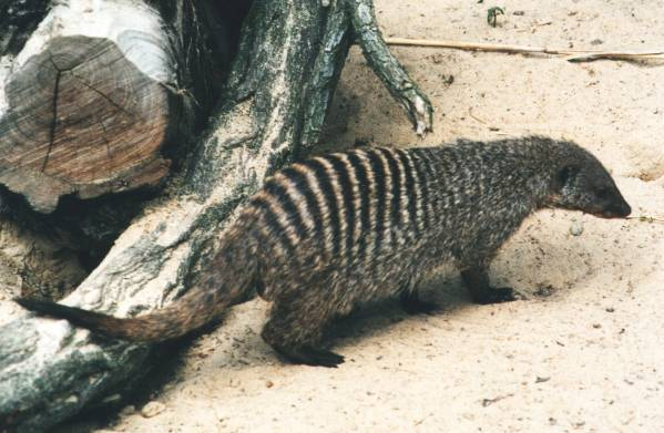 Tierpark Berlin - Zebramanguste (Mungo mungo)